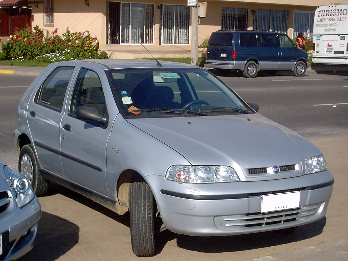 Viña del mar